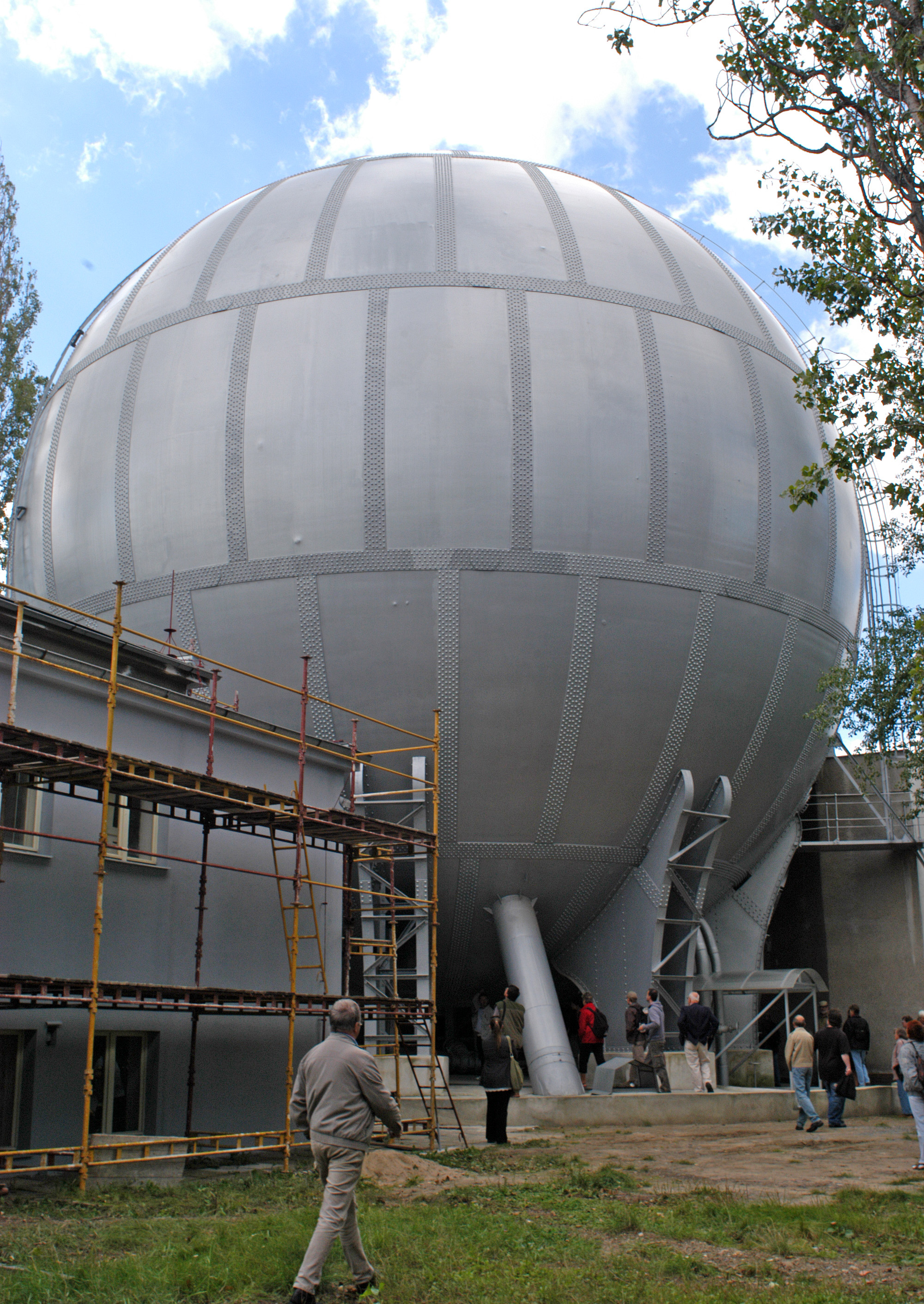 Libeňský plynojem z pozemku VLZÚ.